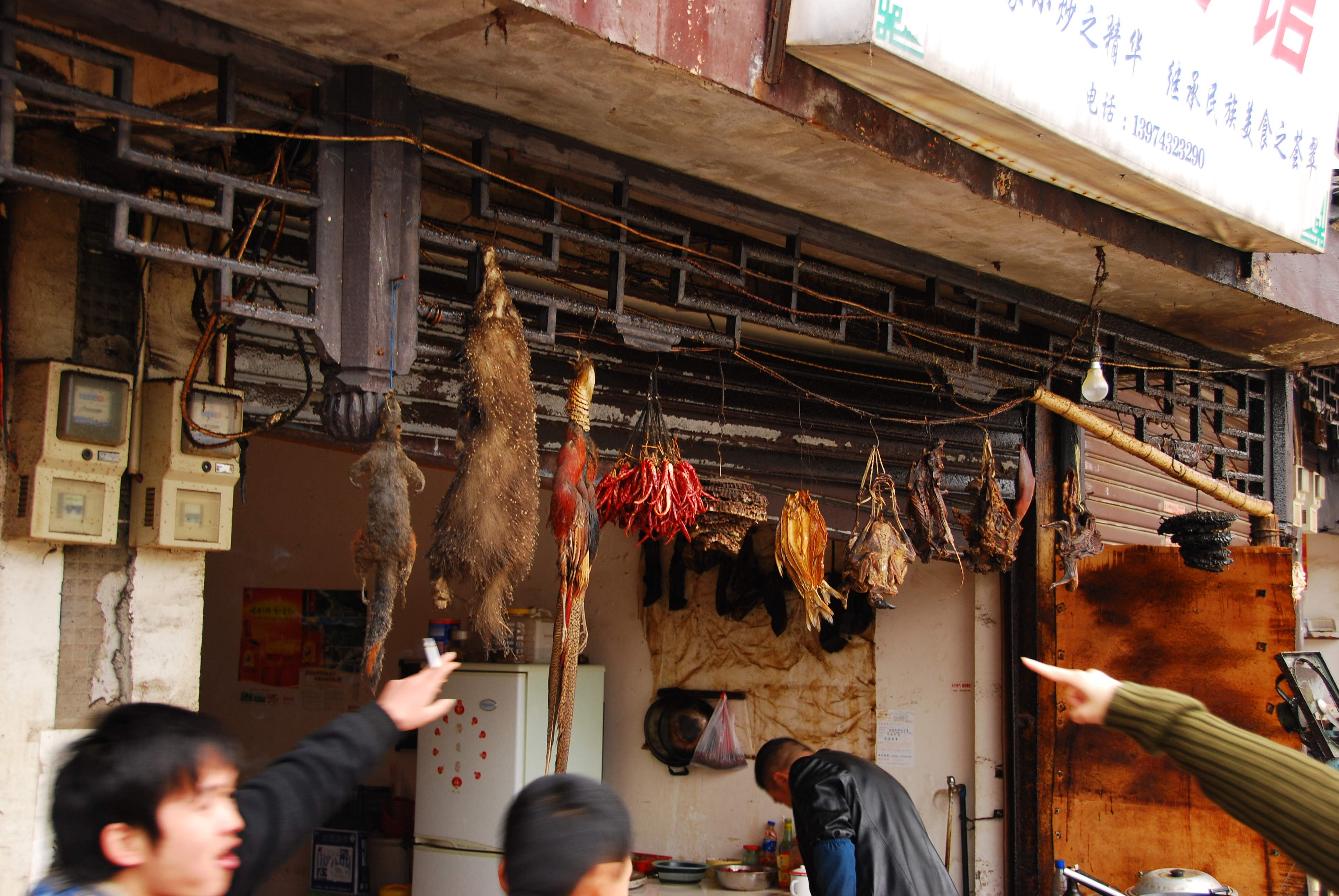 Je mei (野味) Ye mei (野味) Mainland China cuisine野味